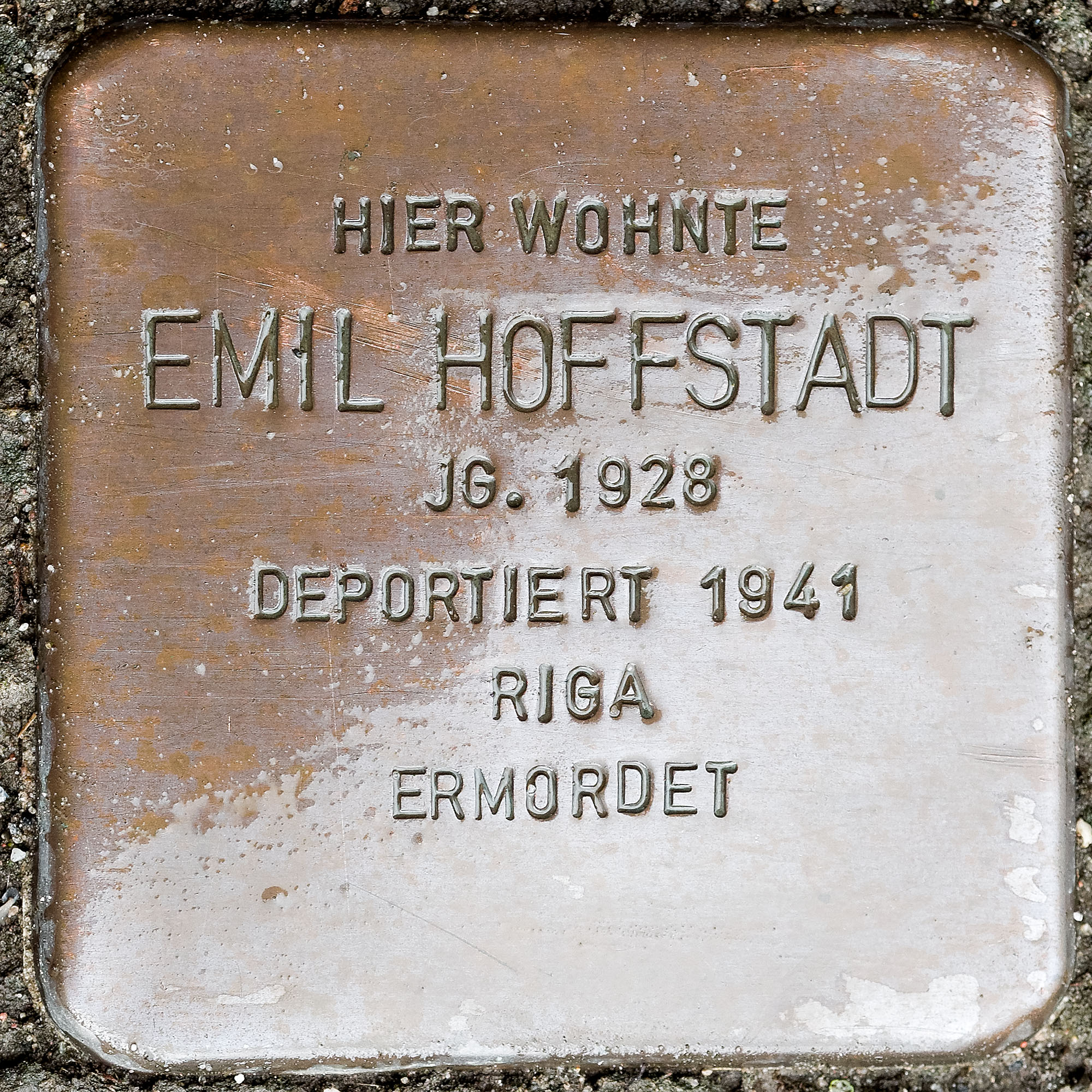 Stolpersteine Straelen: Hoffstadt, Emil